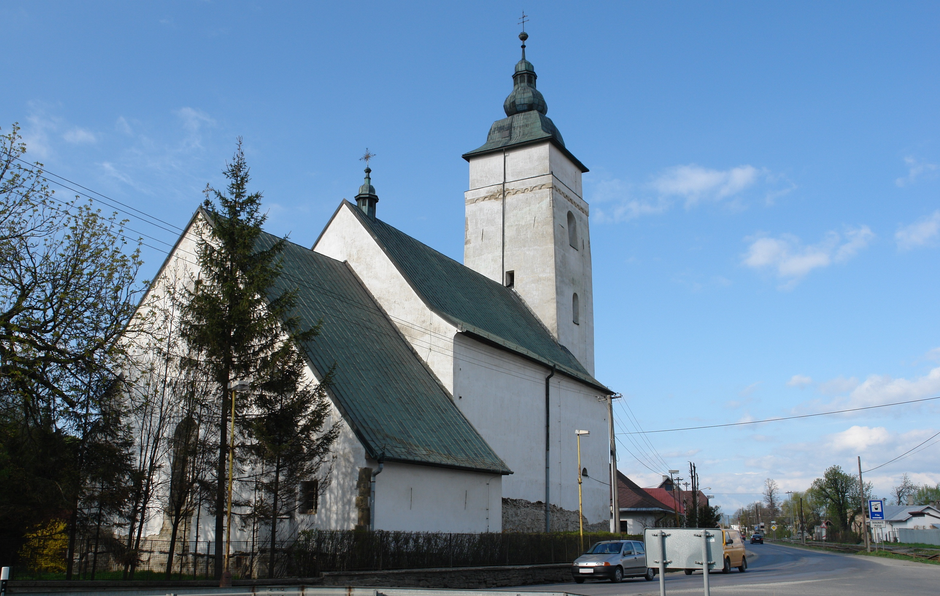 Kakaslomnic, Alexandriai Szent Katalin-templom